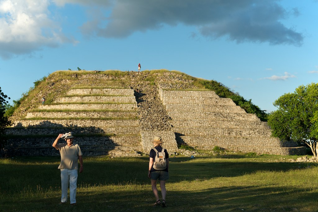 Pirámide llamada Kinich Kakmó en Izamal, Yucatán, México